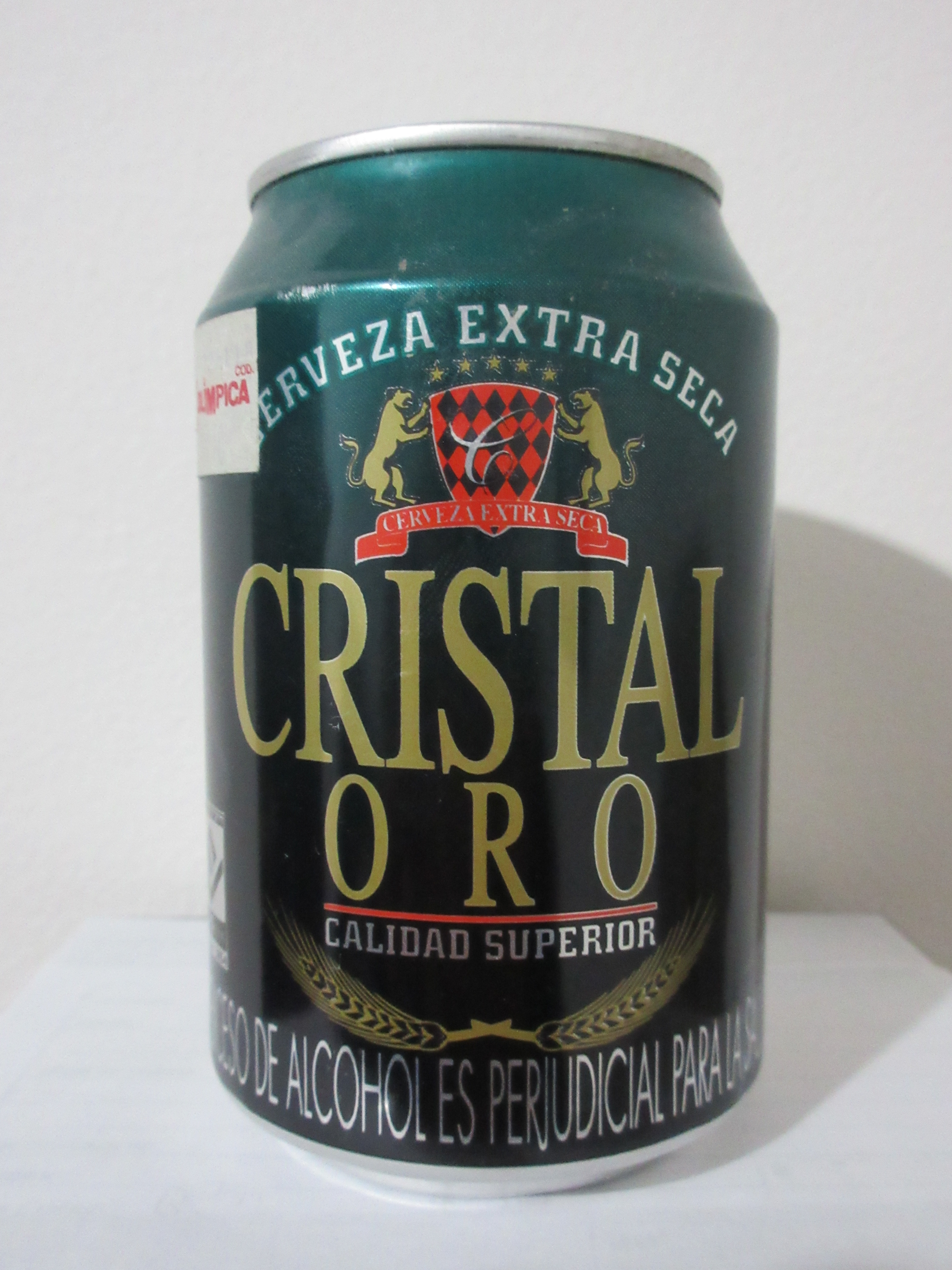 Envase hoja lata de aluminio de la cerveza Cristal Oro - Producto de la desaparecida Cervecería Leona